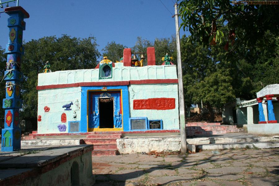 Koulutla Chenna kesava Gudi